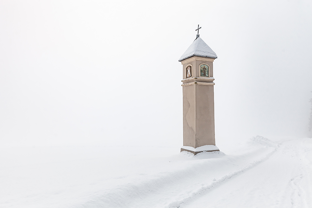 Bardzo rozpoznawalna, przydrożna i zabytkowa kapliczka znajdująca się we wsi Góra Św. Anny